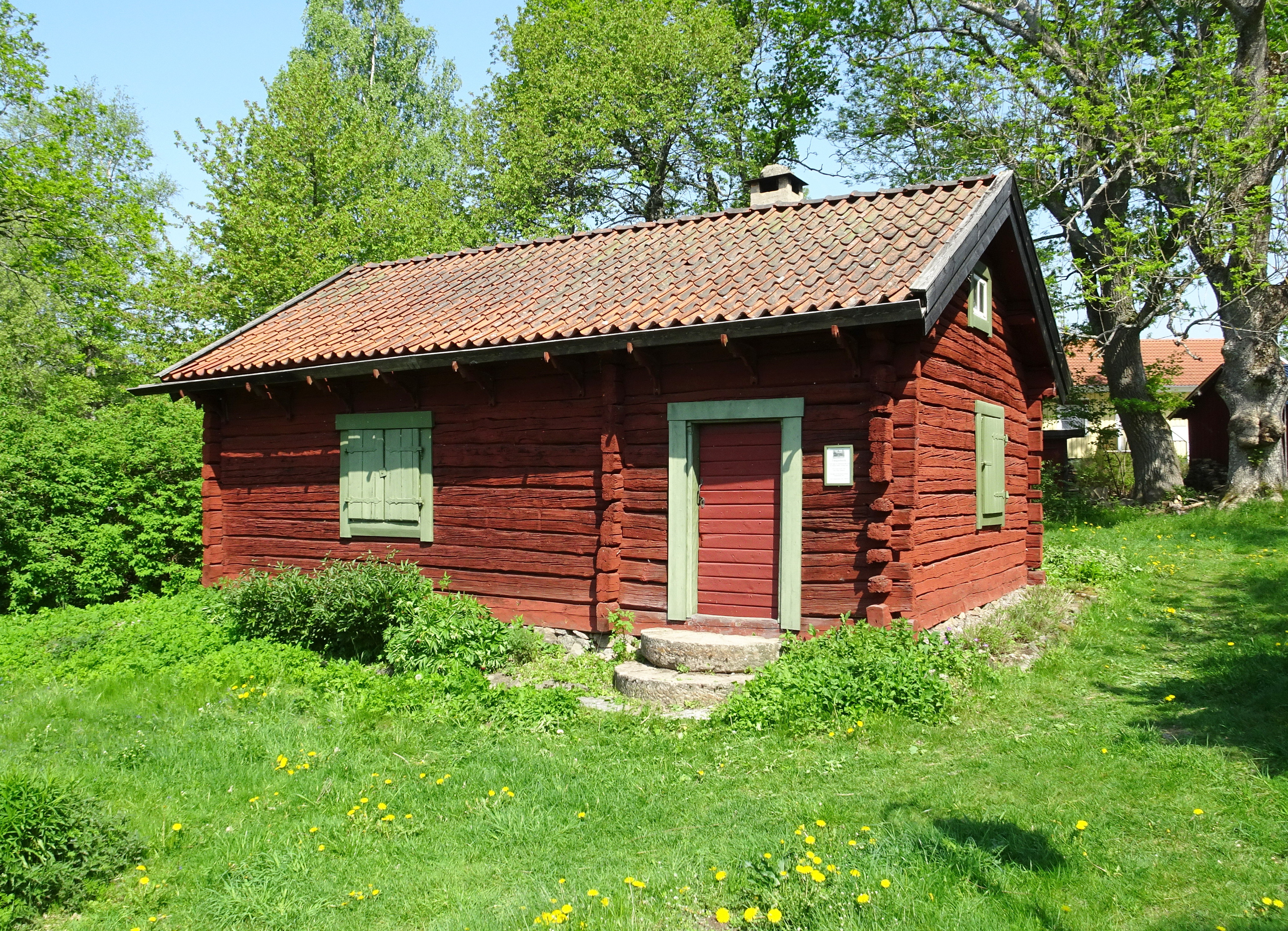 Tullinge Trädgårdstorp, Trädgårdstorpet